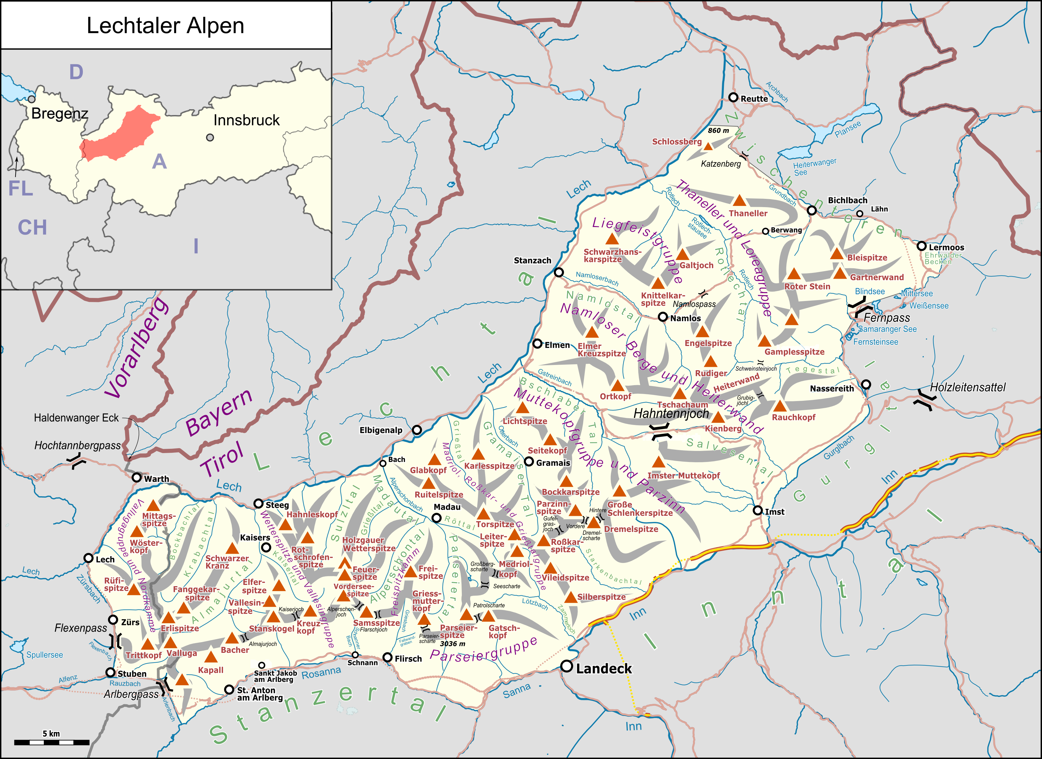 Lagekarte des Lechtaler Alpens